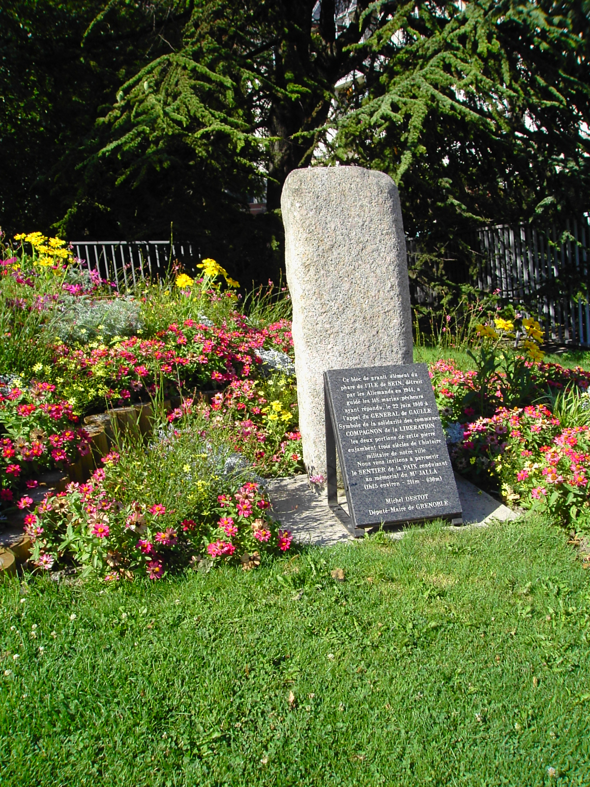 Monument en hommage aux Communes Compagnon de la Libération dans le jardin des Dauphins à Grenoble.